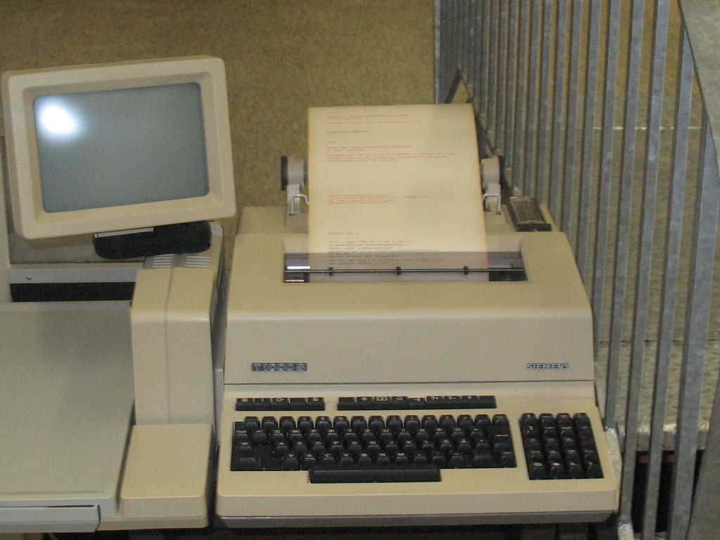 Siemens Telex machine